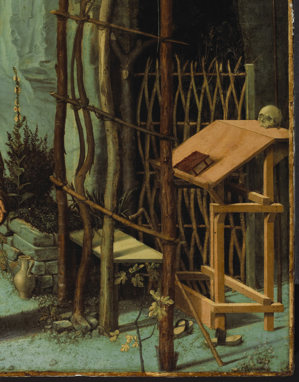 Giovanni bellini, san francesco